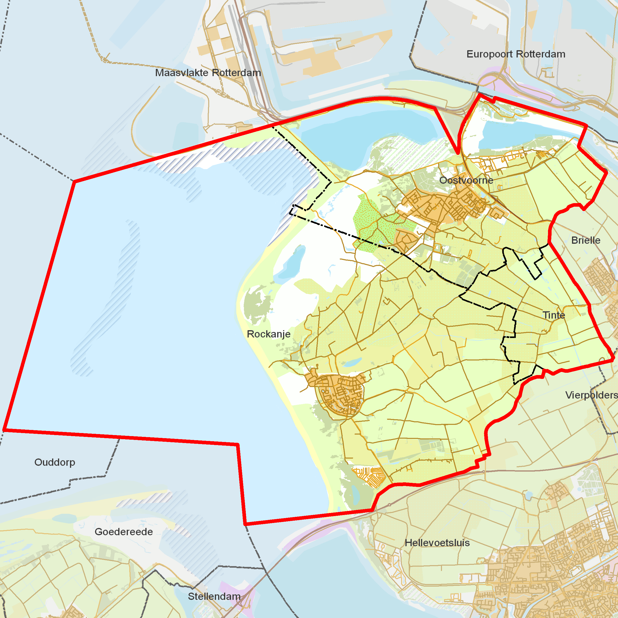 BAG woonplaatsen - Gemeente Westvoorne.png